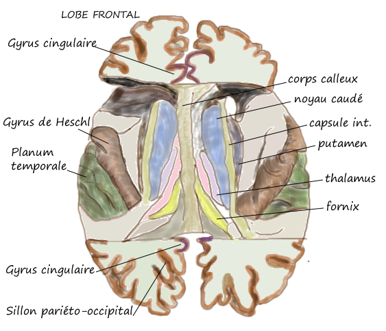 Face supérieure du gyrus temporal supérieur après résection d'une partie des lobes frontal et pariétal